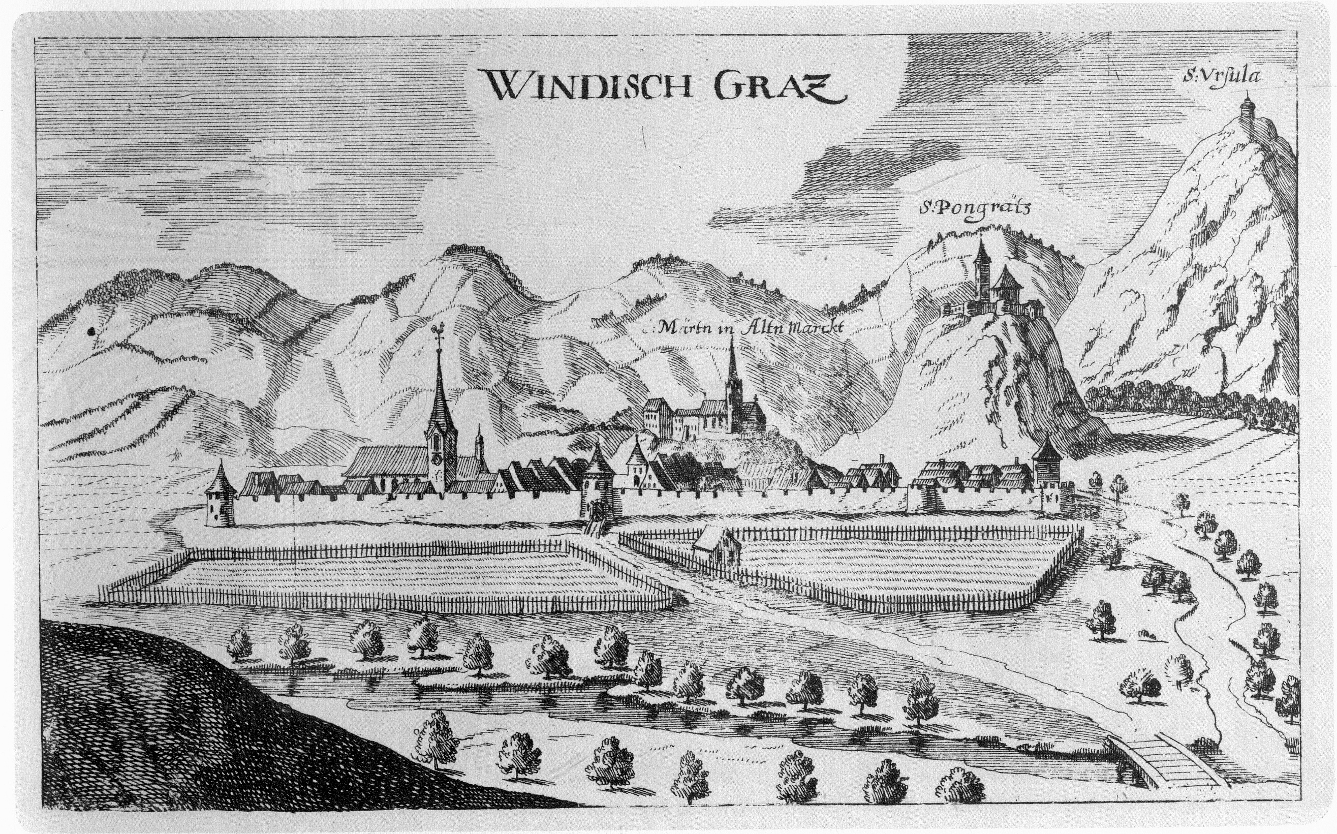 G. M. Vischers Käyserlichen Geographi, Topographia Ducatus Stiriae, Das ist: Eigentliche Delineation / und Abbildung aller Städte / Schlösser / Marcktfleck / Lustgärten / Probsteyen / Stiffter / Clöster und Kirchen / so es sich im Herzogthumb Steyrmarck befinden; Und anjetzo Umb einen billichen Preyß zu finden seynd Bey Johann Bitsch Universitäts Buchhandlern / Auff dem Juden=Platz bey der guldenen Saulen. Graz 1681 Die Nummerierung der Dateien folgt der alphabetischen Reihung der Ortsnamen und entspricht nicht dem Vischer-Register